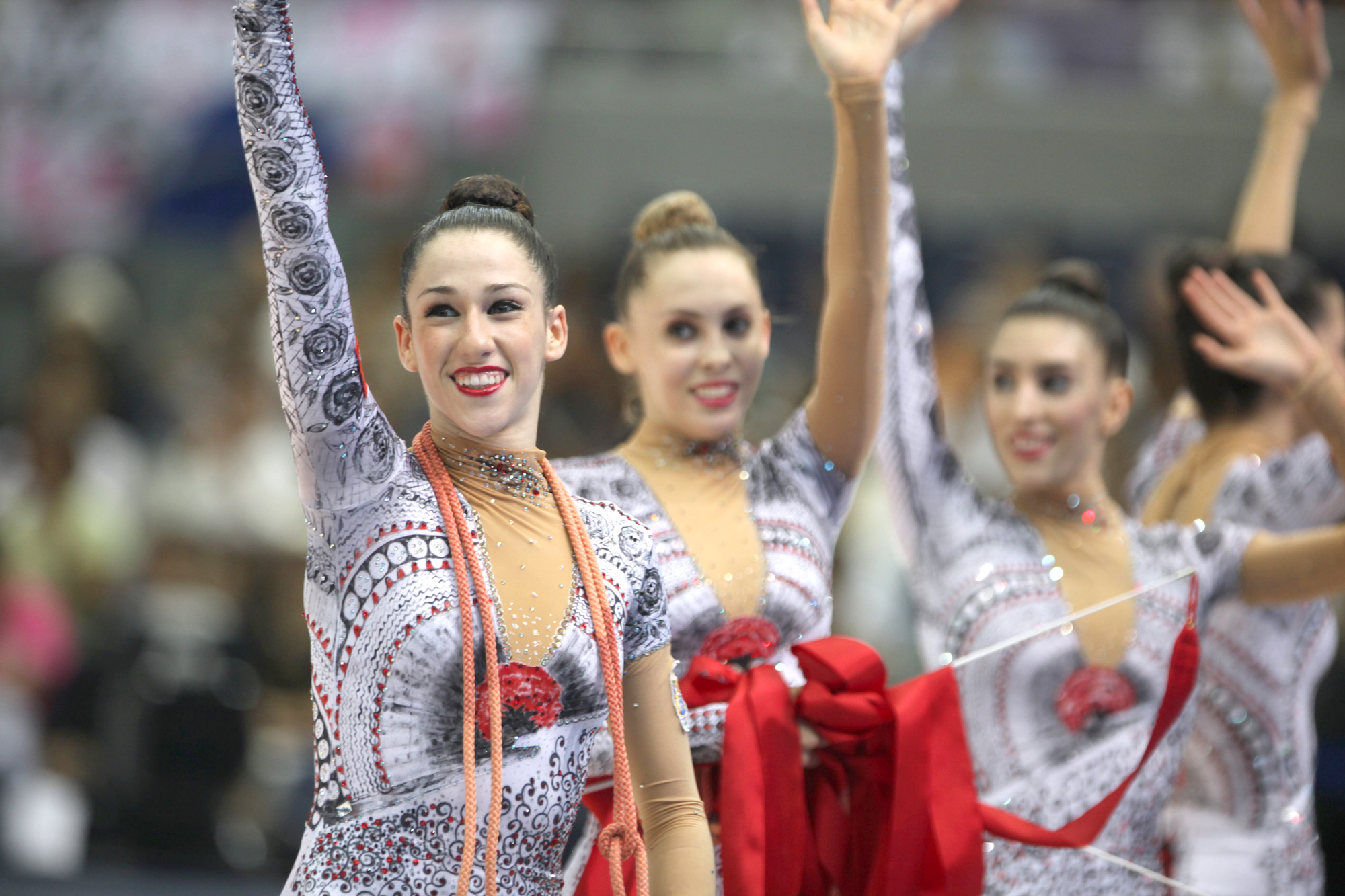 El conjunto español en el Campeonato Mundial de Mie en 2009.